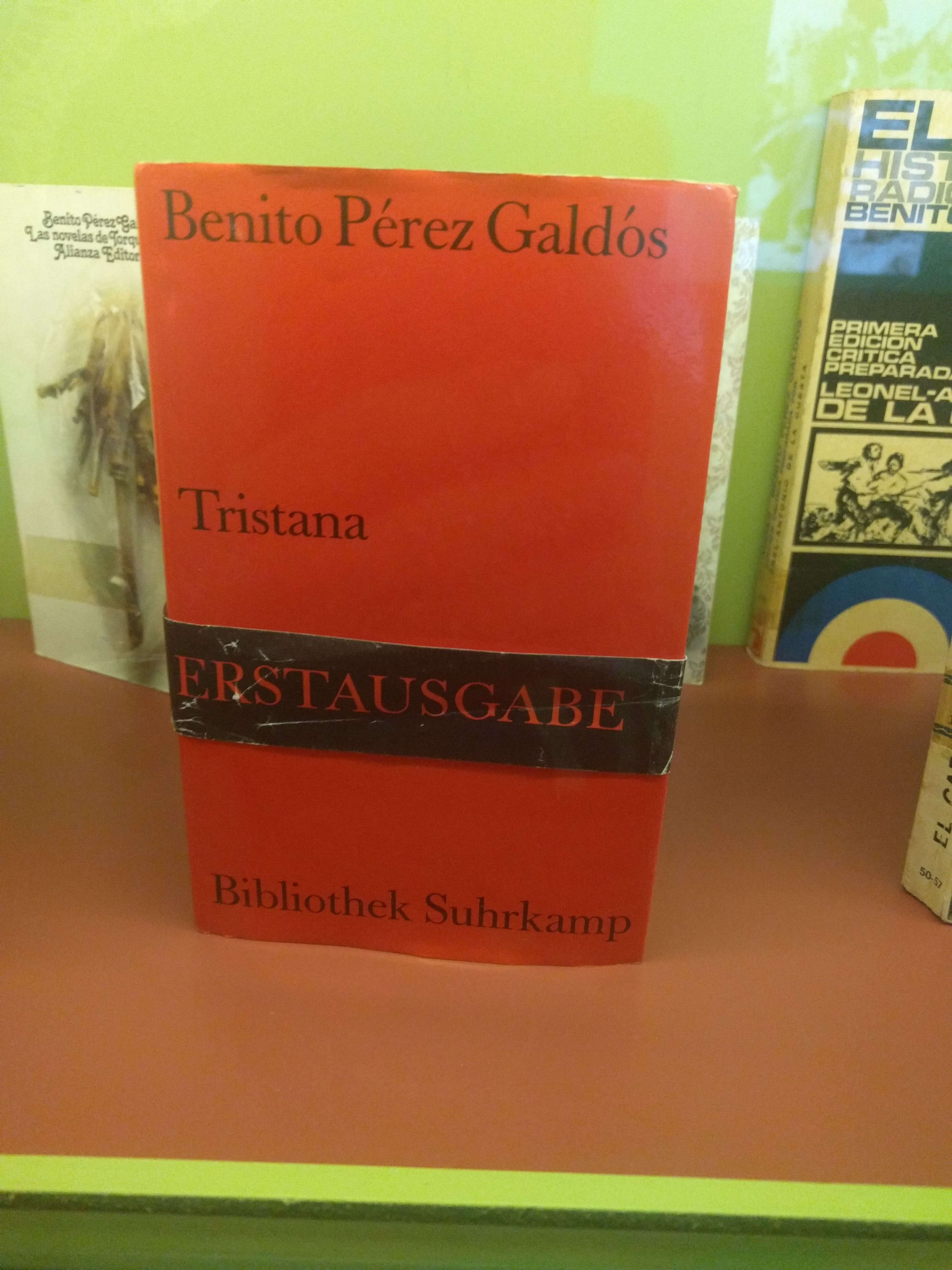 Tristana, de Benito Pérez Galdós, primera edición en alemán. Casa-Museo Pérez Galdós.